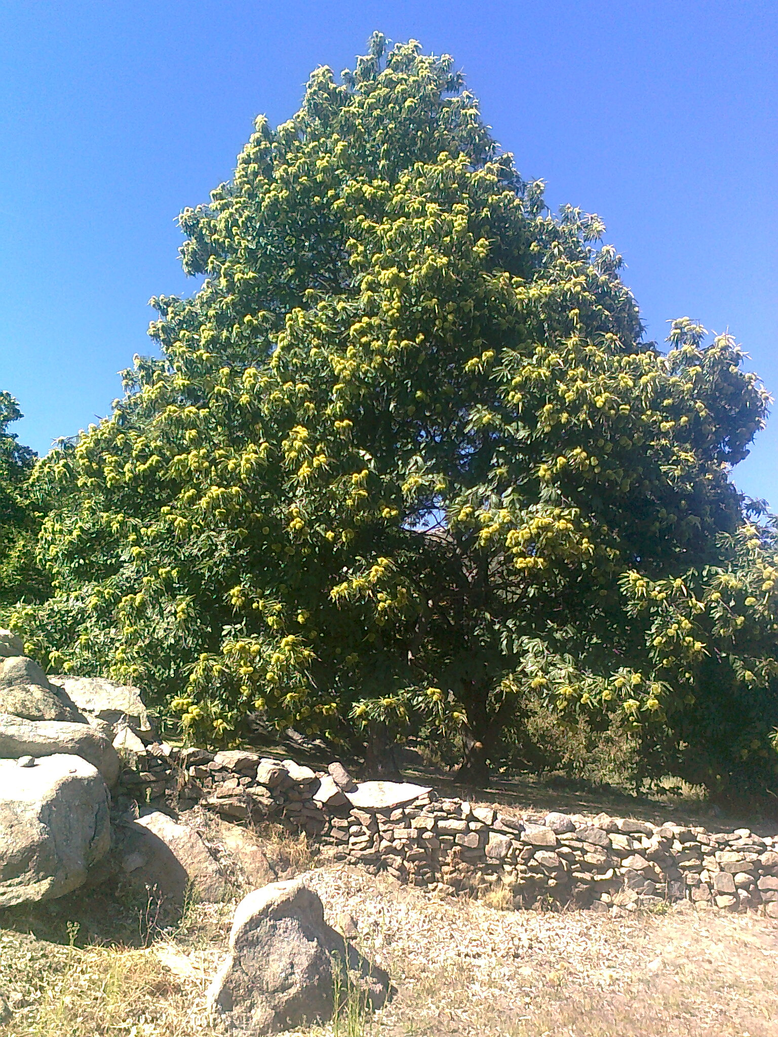 Castaño en laS sierras de El Torno